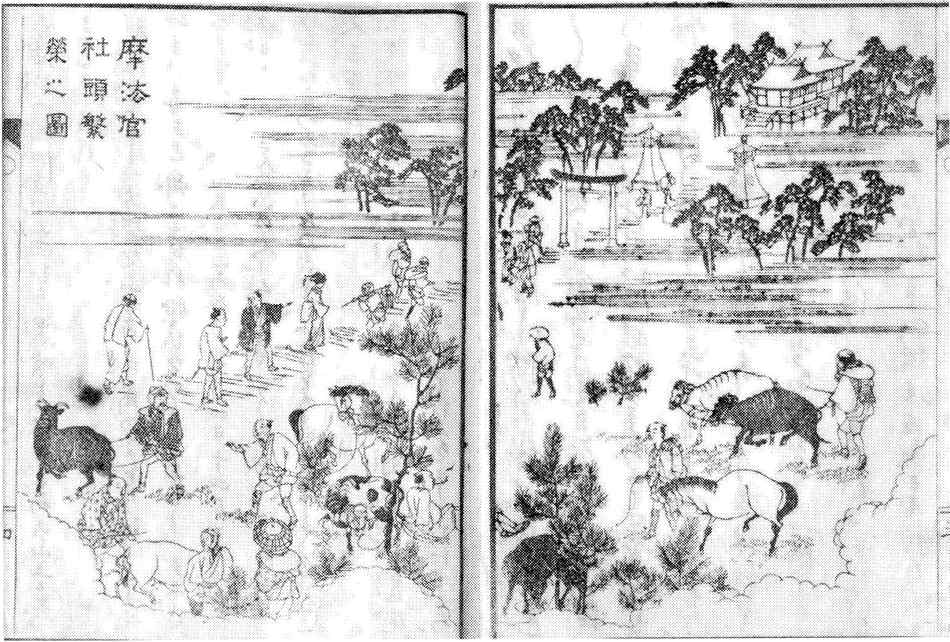 Bizen Kamo Nihon-ichi Tanuki Ichidaiki (備前加茂日本一狸由来記)